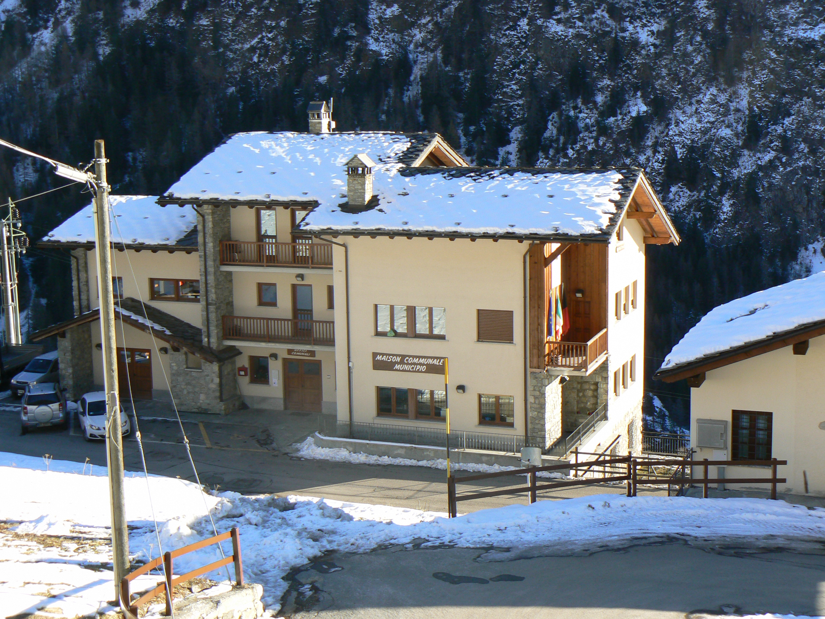 Sede del municipio e della biblioteca di Bionaz, Valle d'Aosta, Italia.